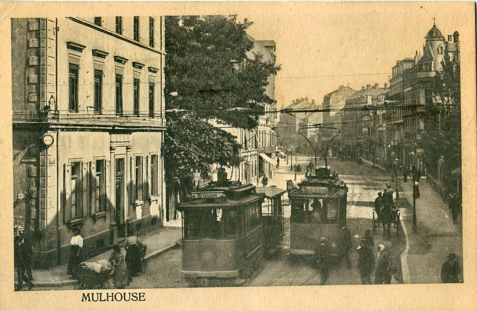 Carte postale éditée par MT, n°77 : MULHOUSE. La carte, sans titre, représente le croisement de deux tramways électriques dans la Colmarer Strasse (actuelle Avenue de Colmar) à hauteur de la Graben Strasse (actuelle Avenue du Président Kennedy). On se trouve approximativement à l'emplacement de l'actuelle Porte Jeune.